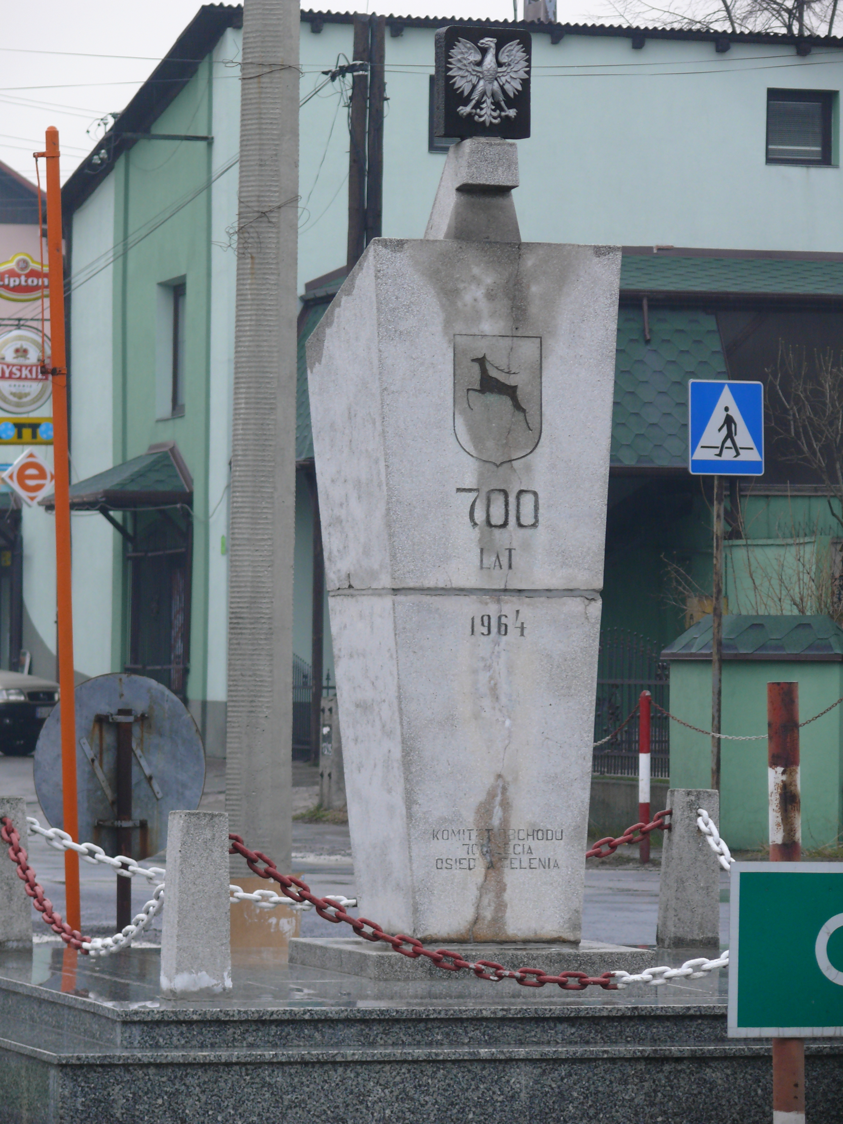 Pomnik z okazji 700-lecia Jelenia.